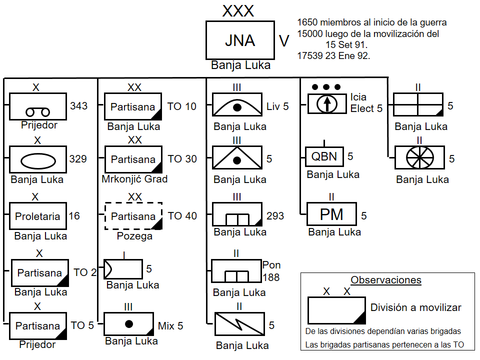 Confeccionado sobre la base de: JNA. Phone book: military post code 5027 SARAJEVO. Sarajevo, enero 1992. Documento ICTY ET SA03-4828 – SA03-4856. Página 6. Testigo SELAK, Osman. Declaración en Caso Número IT-99-36-T (Radoslav Brdjanin y Momir Talic). ICTY. La Haya, 15 de enero de 2003. Página 12870 Thomas, Nigel; Mikulan, Krunoslav: Pavlovic, Darko. The Yugoslav Wars - Slovenia & Croatia 1991-95. Osprey Publishing Ltd. Gran Bretaña 2006. Pag 9.